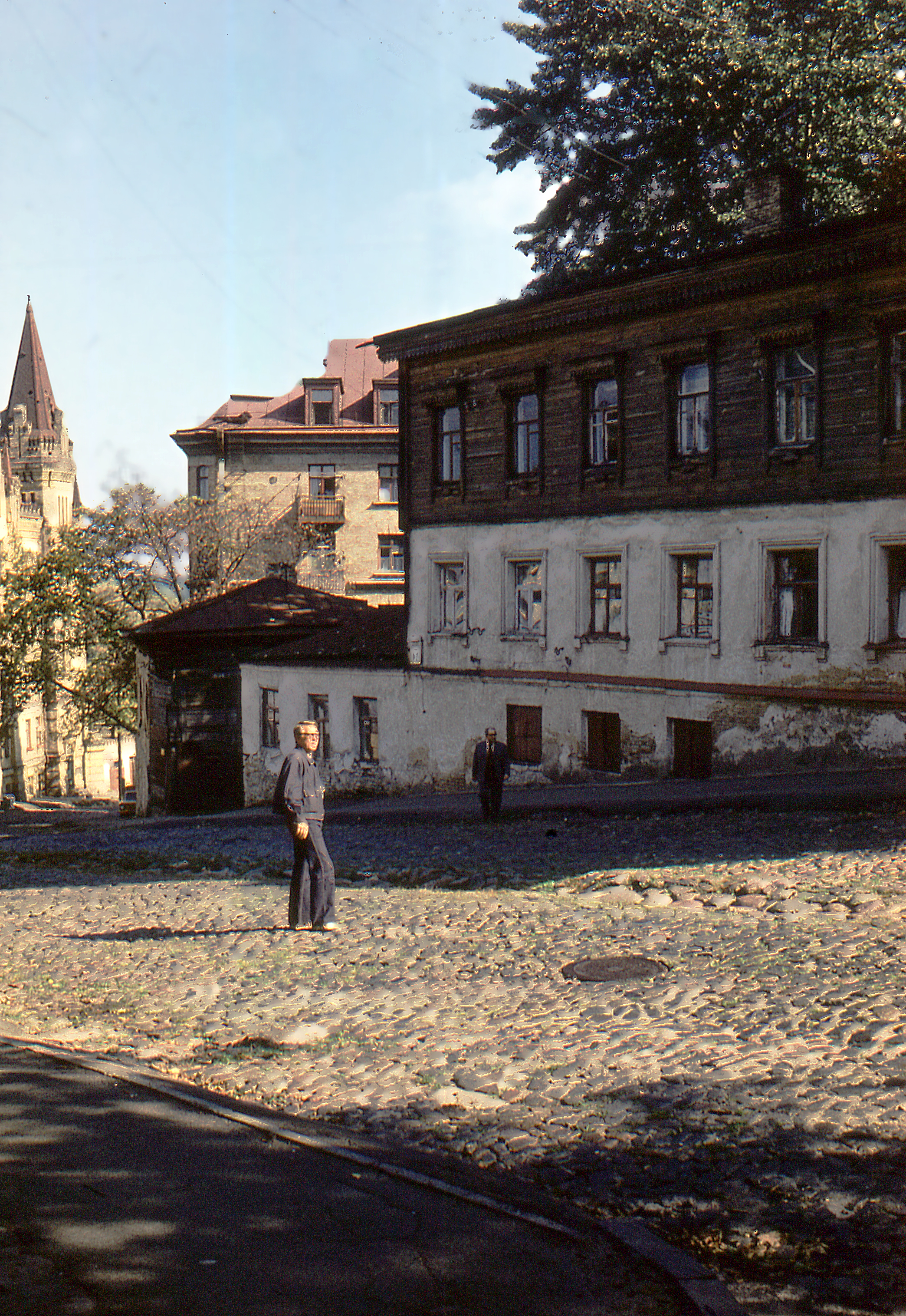 Дом Турбиных.Андреевский спуск, Киев.